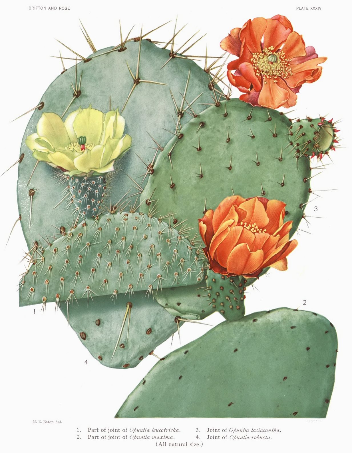 1 Opuntia leucotricha, 2 Opuntia ficus-indica, 3 Opuntia lasiacantha, 4 Opuntia robusta.